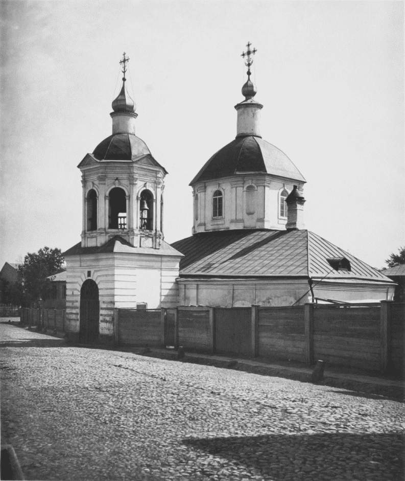 Храм преподобного Сергия Радонежского в Крапивниках